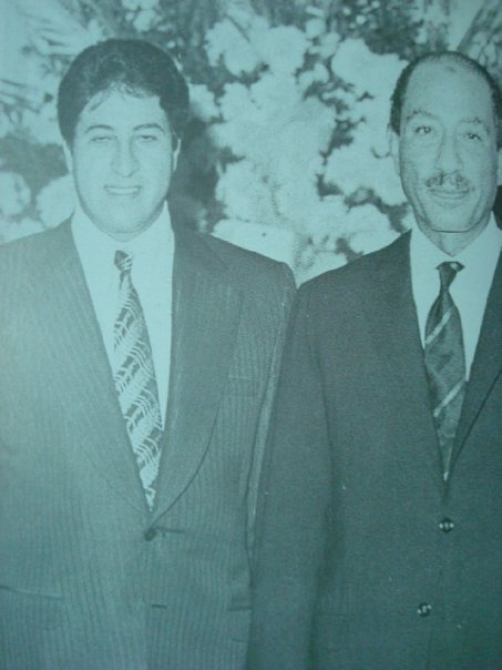 صورة الشهيد طيار عاطف أنور السادات الذي أستشهد في حرب 6 أكتوبر العاشر من رمضان